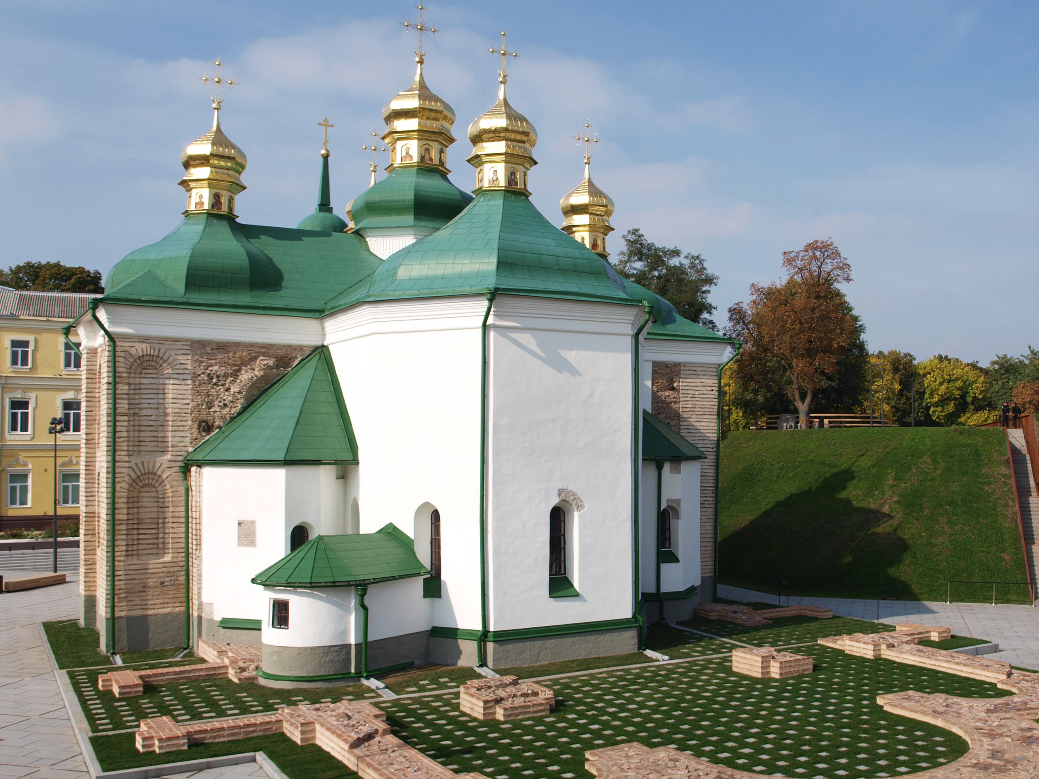 Церква Спаса на Берестові після реставрації 2017-2019 років, Київ, вул. Лаврська, 5